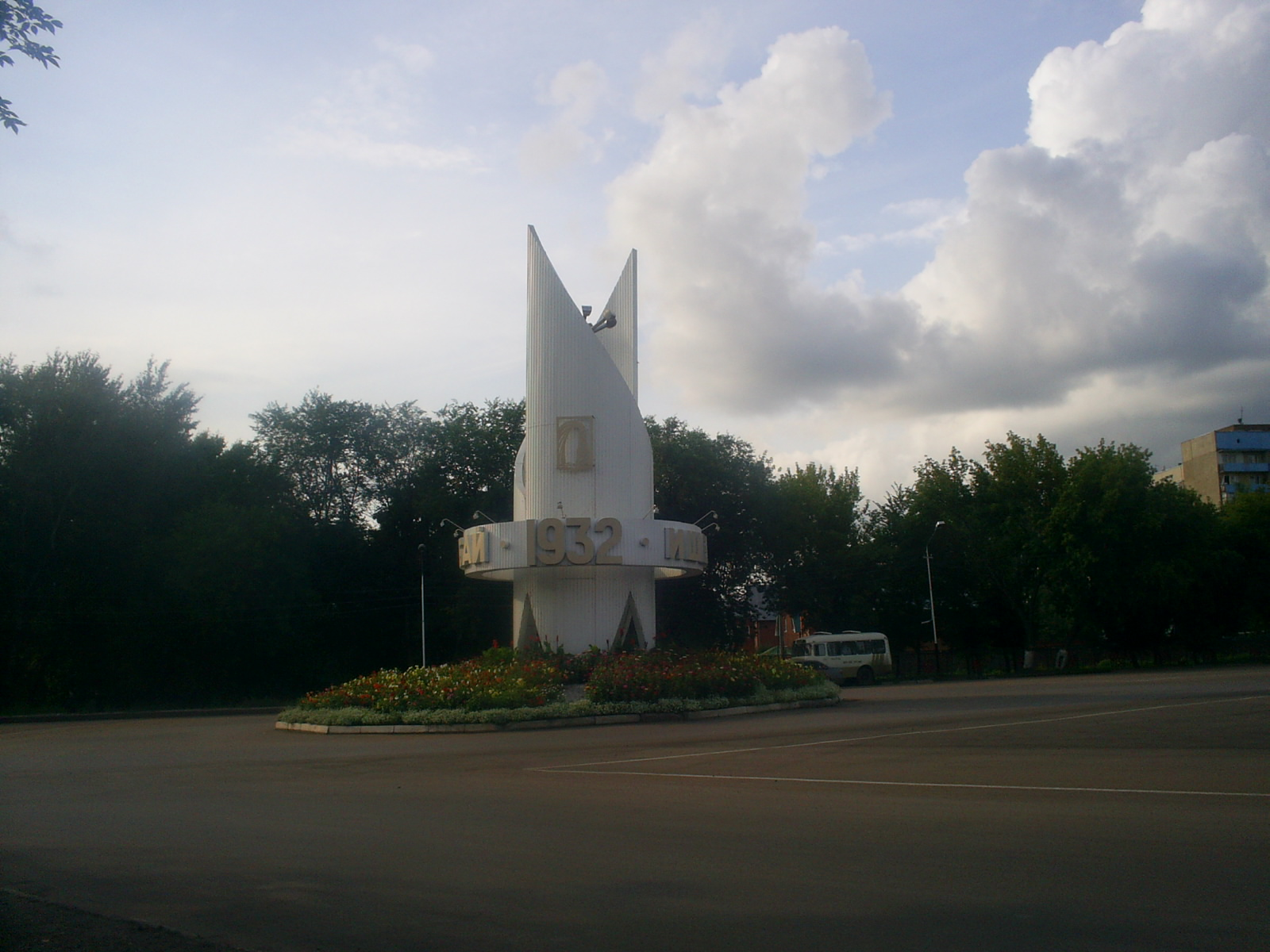 Стела на въезде в город 8.07.2006